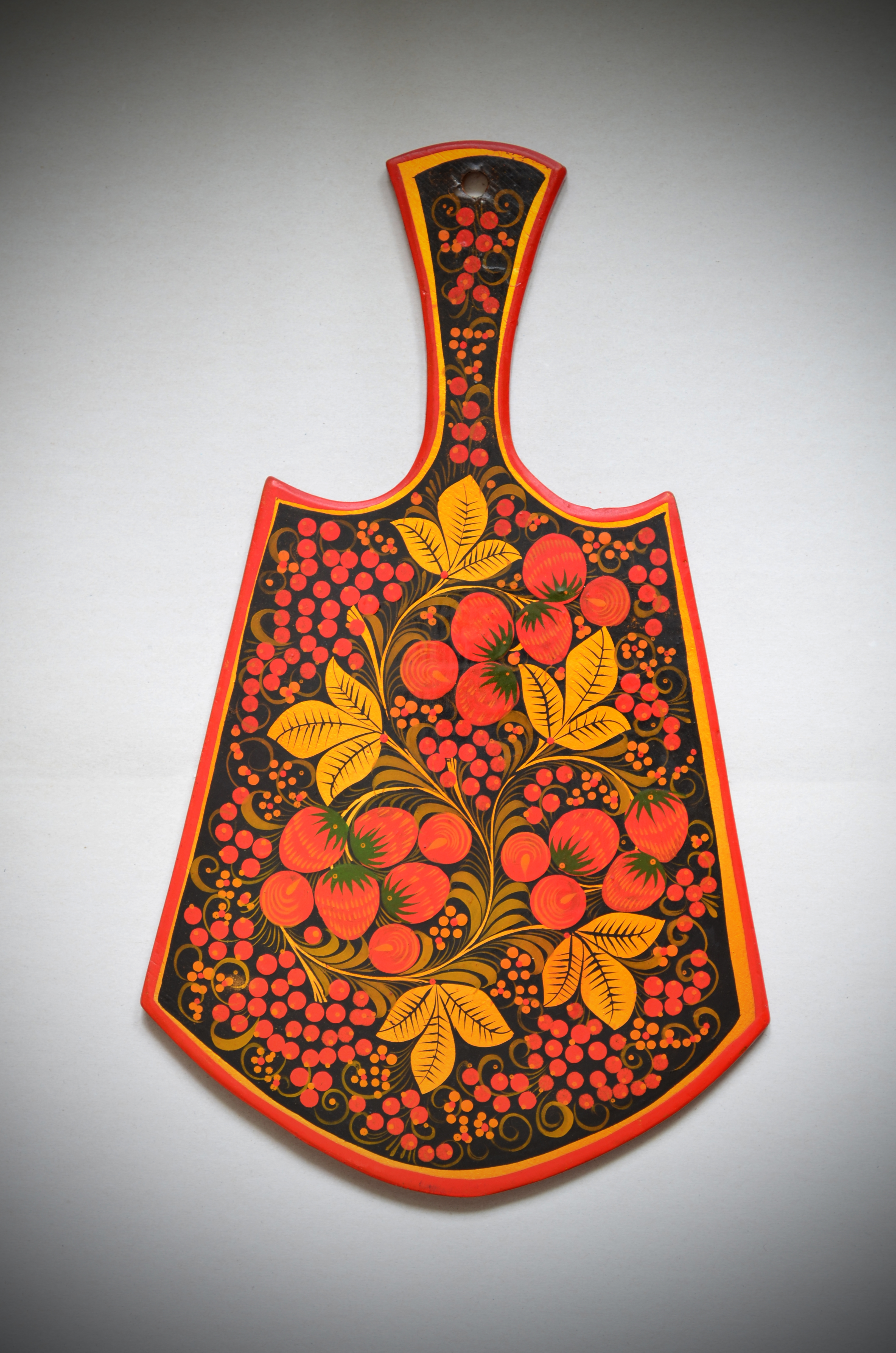 Хохломская роспись на разделочной доске.Россия,Нижегородская область.